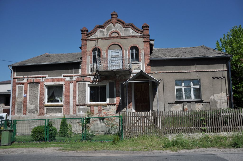 Miejsce gdzie stacjonowała SG i PP w Goli do 1939 r. Stan 2018 r.